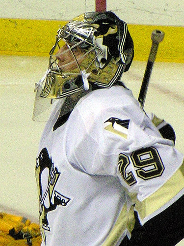 Marc Andre Fleury